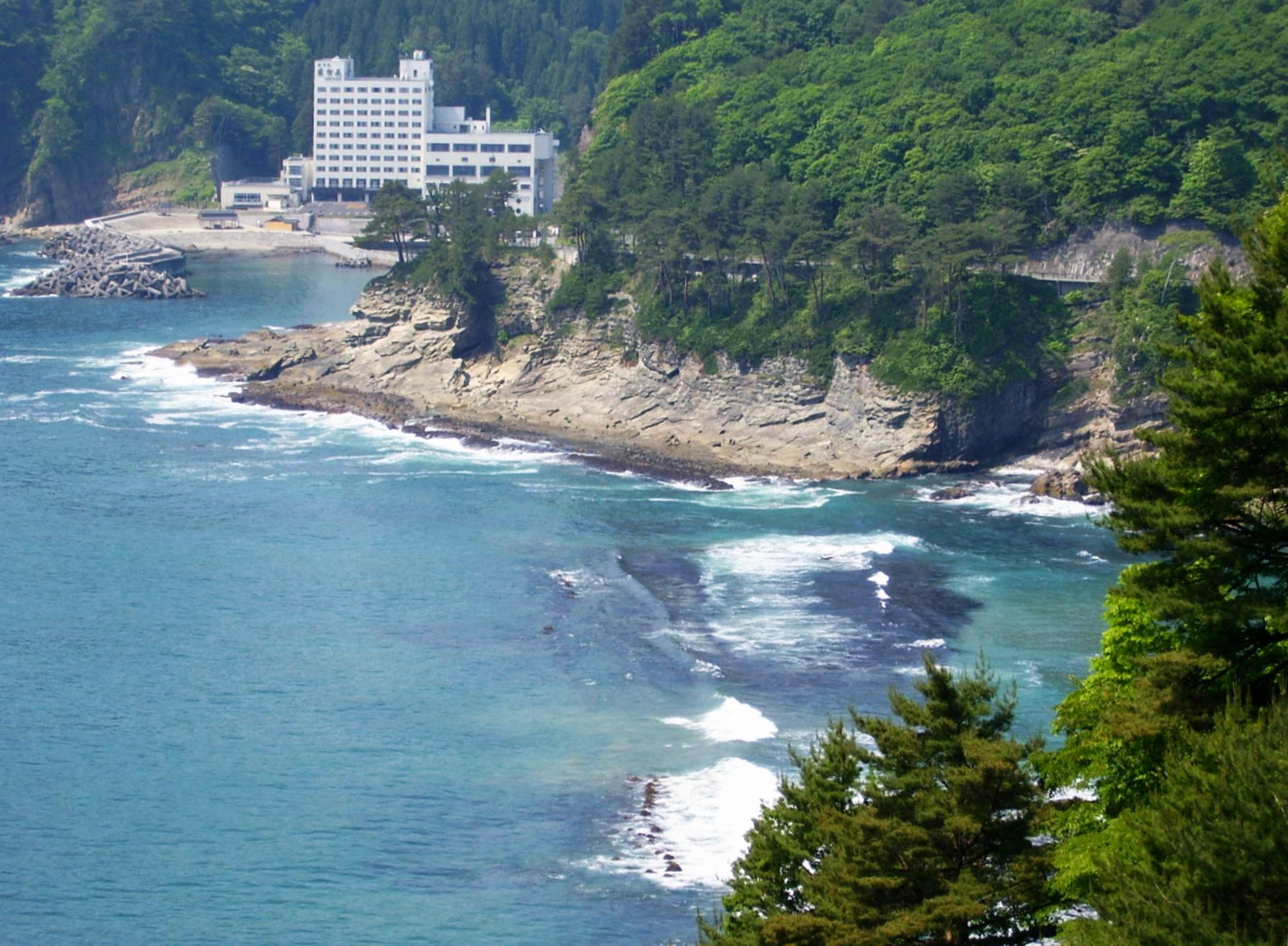 ホテル羅賀荘Hotel Raga-sou